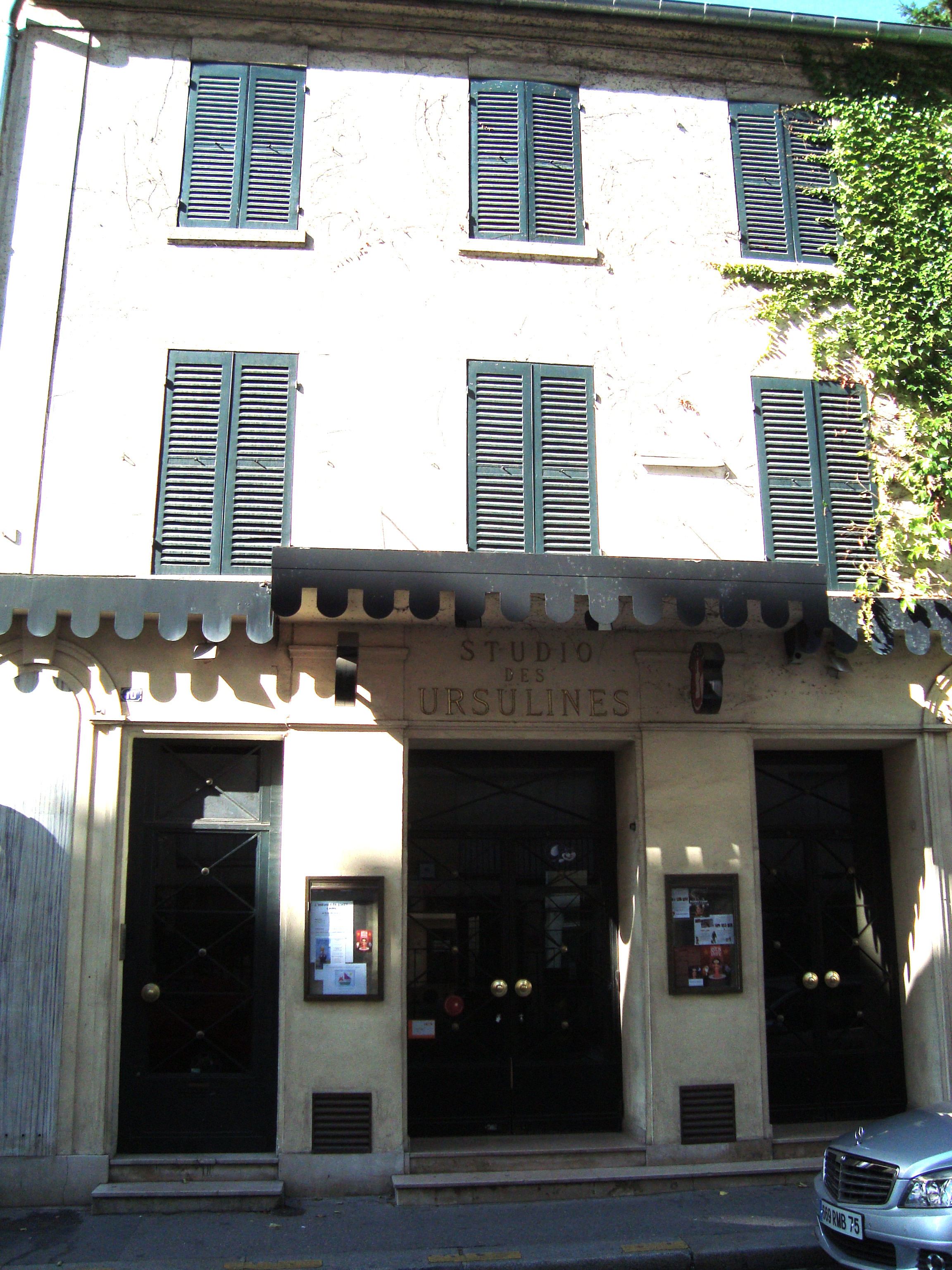 Le cinéma Studio des Ursulines, rue des Ursulines à Paris